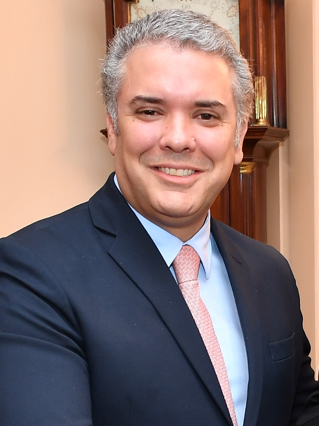 Iván Duque Márquez